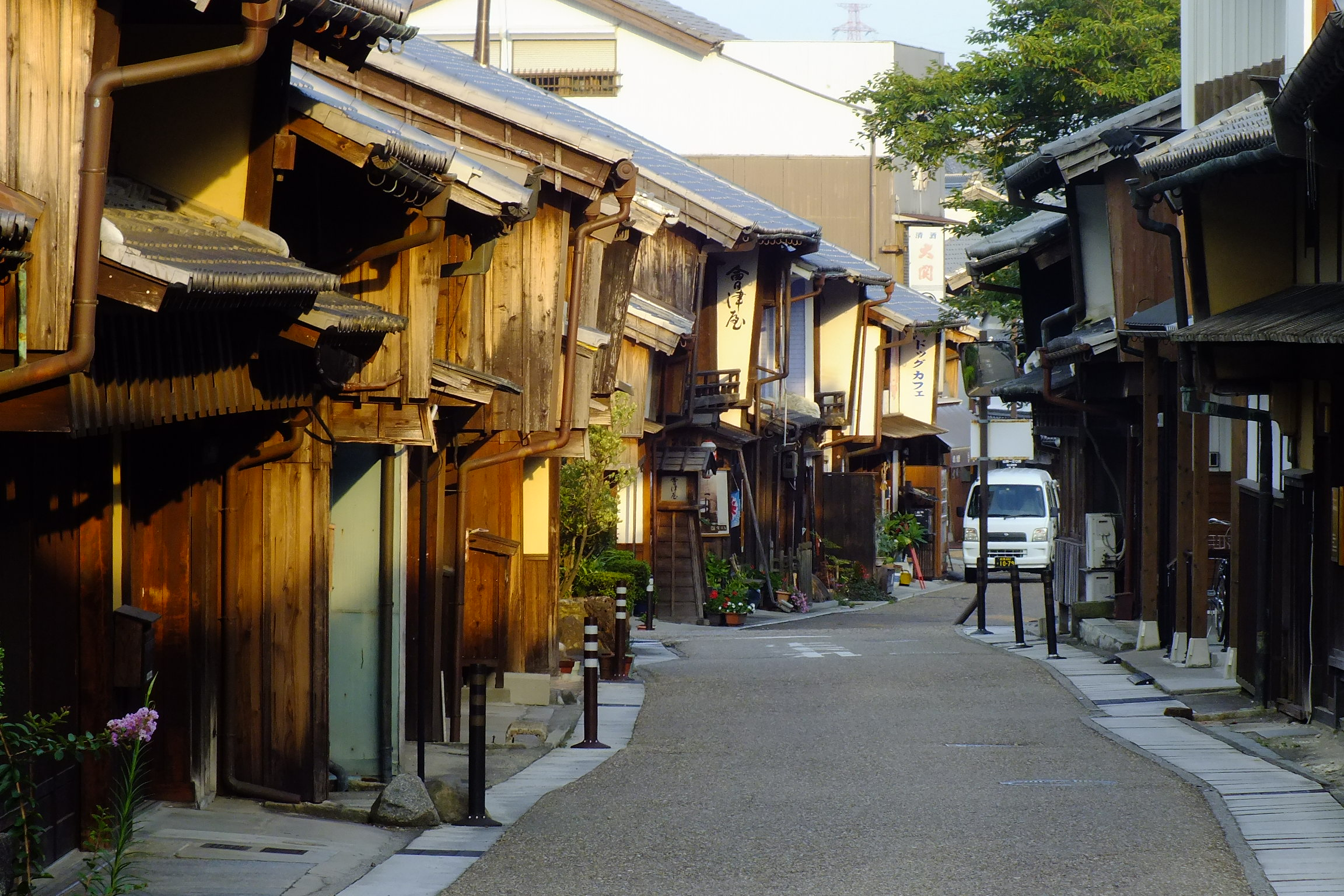 2016-08-05 Tokaido Seki Juku Kameyama City Mie,東海道五十三次 関宿